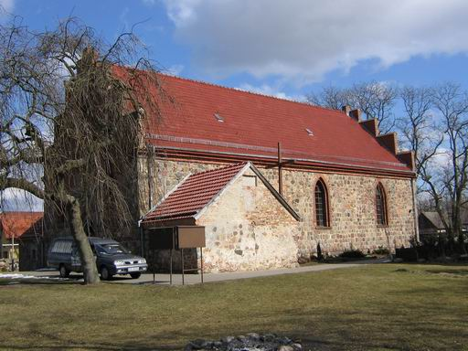 Kościół parafialny pw. Matki Bożej Królowej Świata w Dobrej, ok. 1250 — widok z płd.-zach.